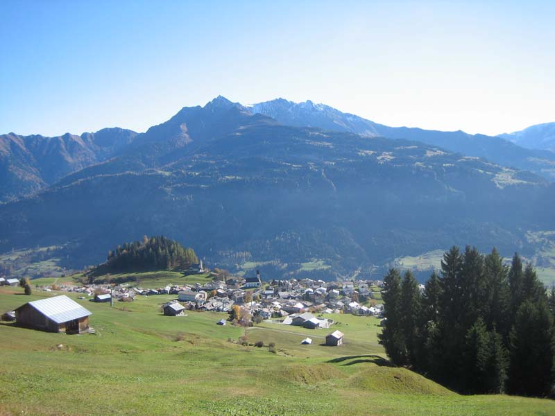 Falera GR